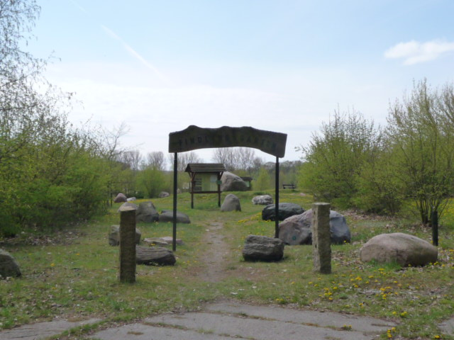 Eingangstor zum Findlingsgarten in Zitterpenningshagen mit anschließendem Rundweg